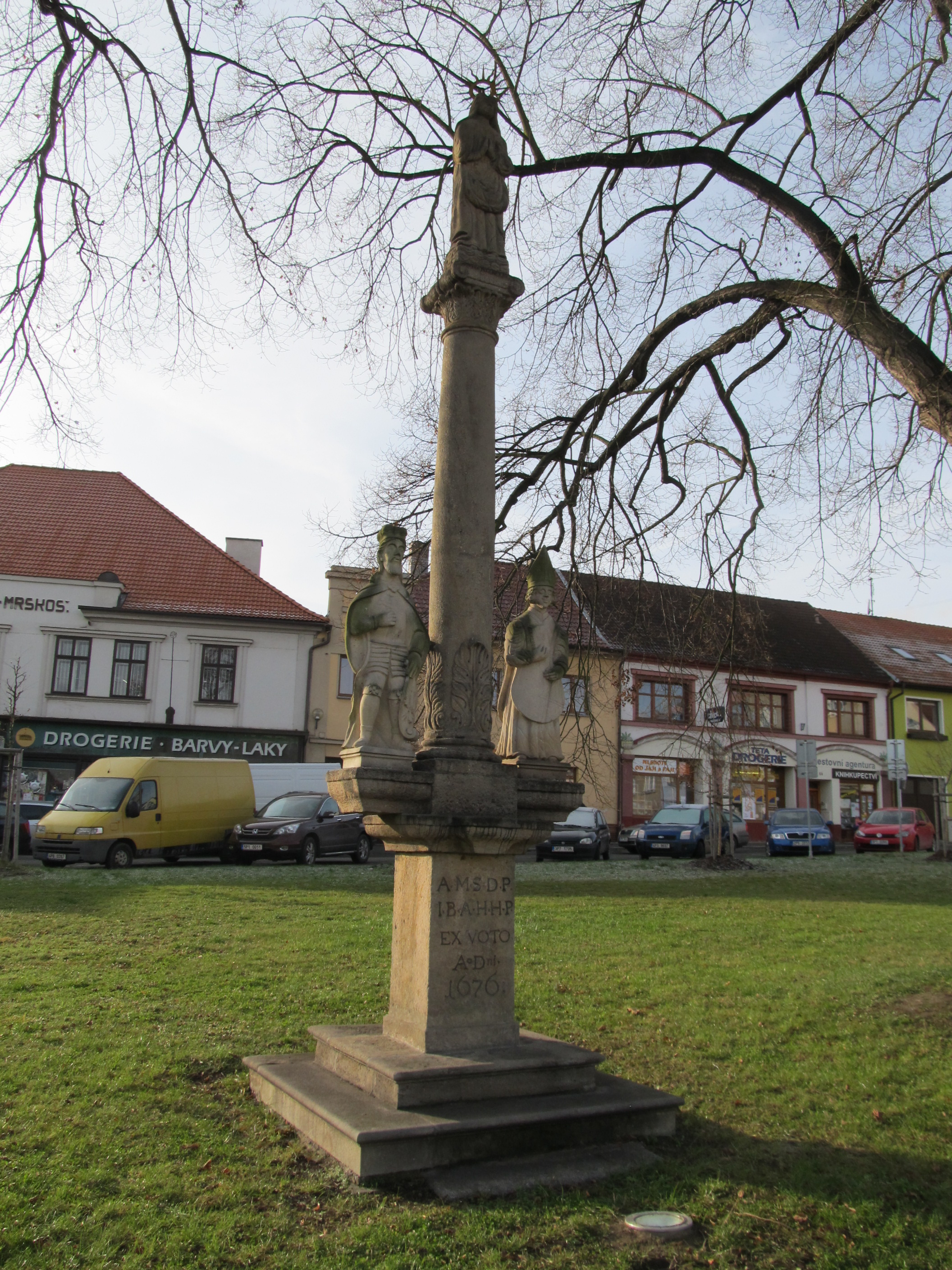 Přeštice - mariánský sloup na náměstí se sochami sv. Václava a sv. Vojtěcha.